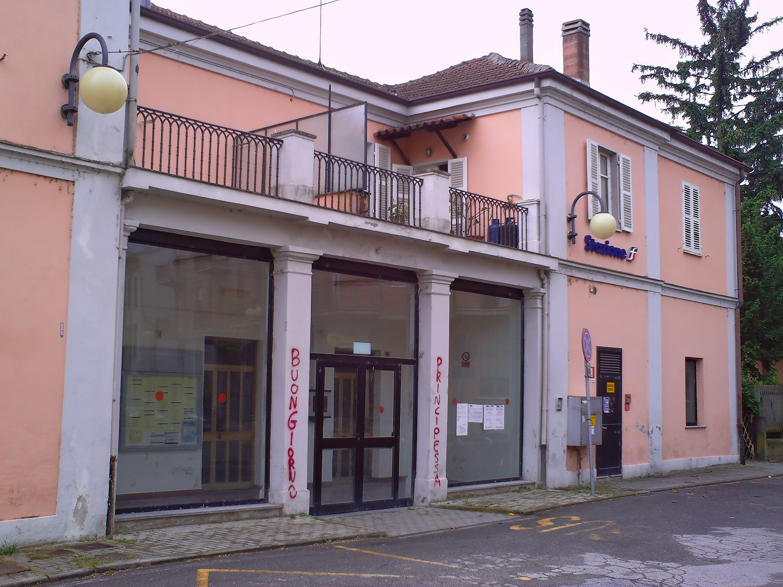 Facciata della stazione di Castagnole delle Lanze (AT), Italia.